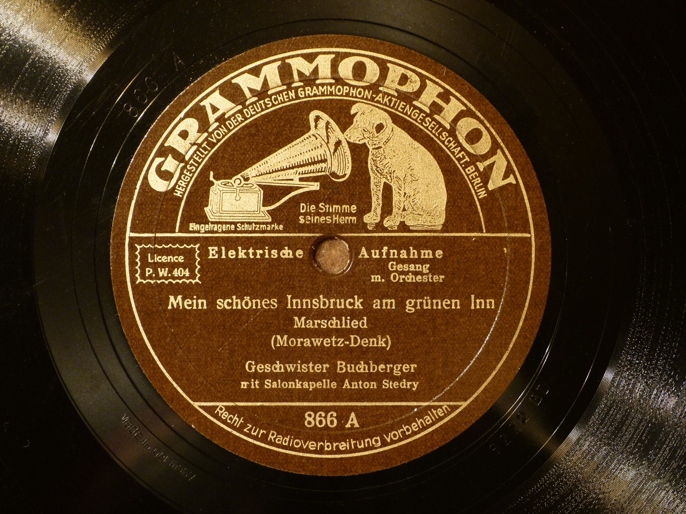 Erste Schallplatte der Geschwister Buchberger, 1931 Grammophon Gr 866a, "Mein schönes Innsbruck am grünen Inn"